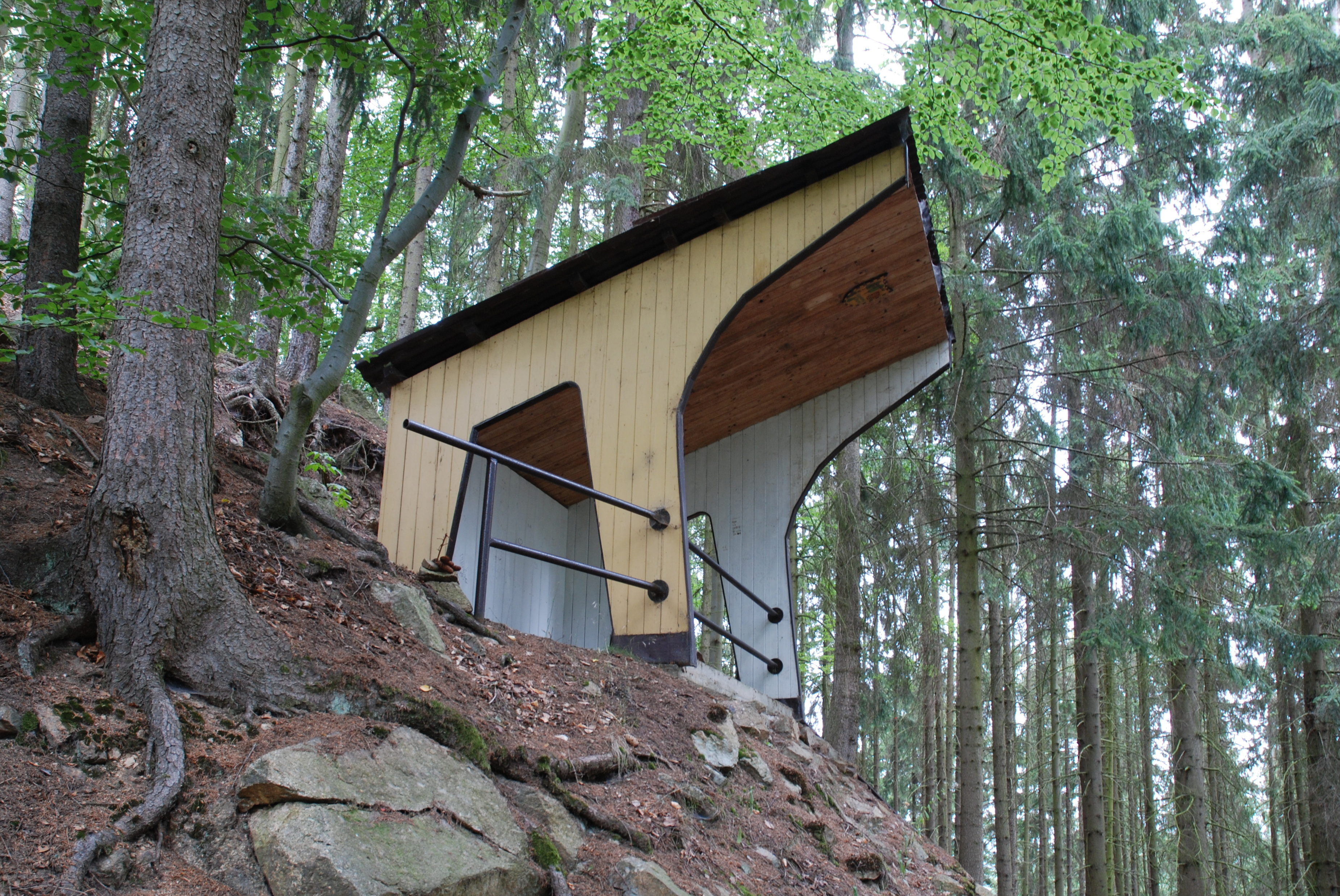 Libušina chata při Beethovenově cestě v karlovarských lázeňských lesích